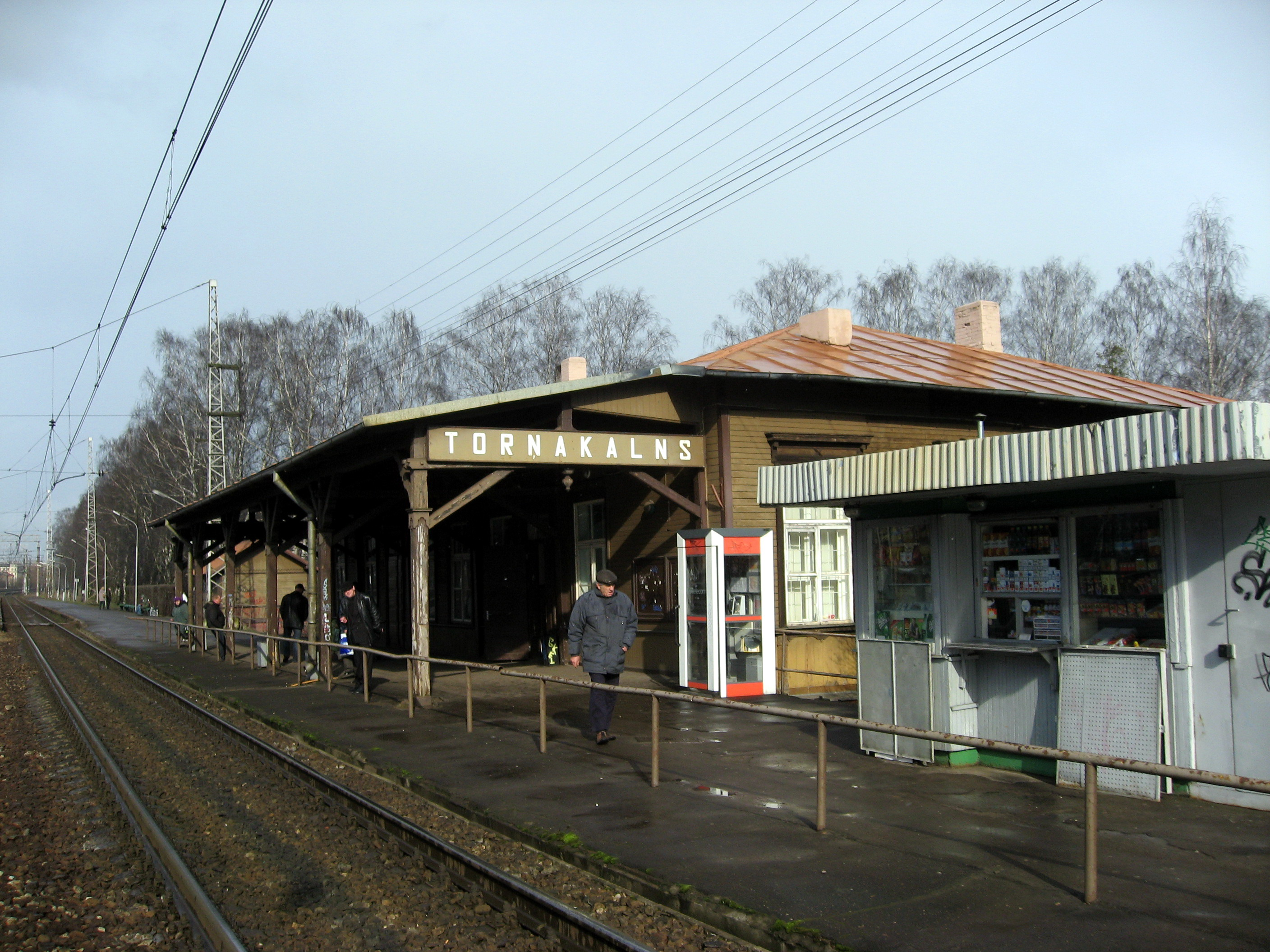 Riga, Torņakalns